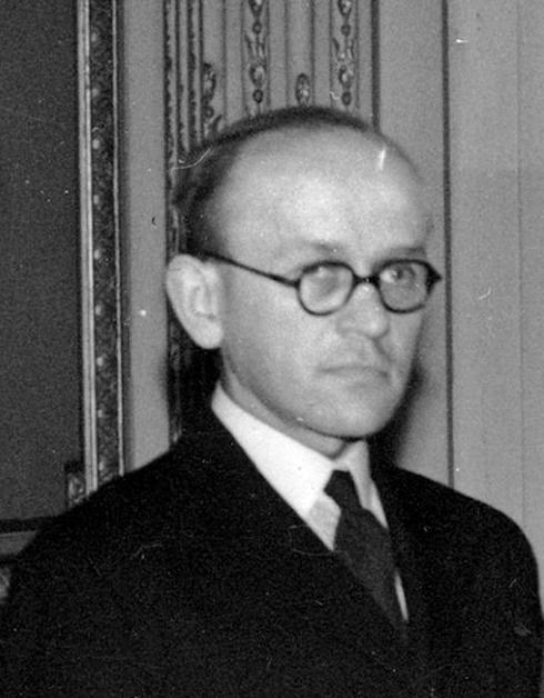 Członkowie rządu Tomasza Arciszewskiego. Stanisław Sopicki.